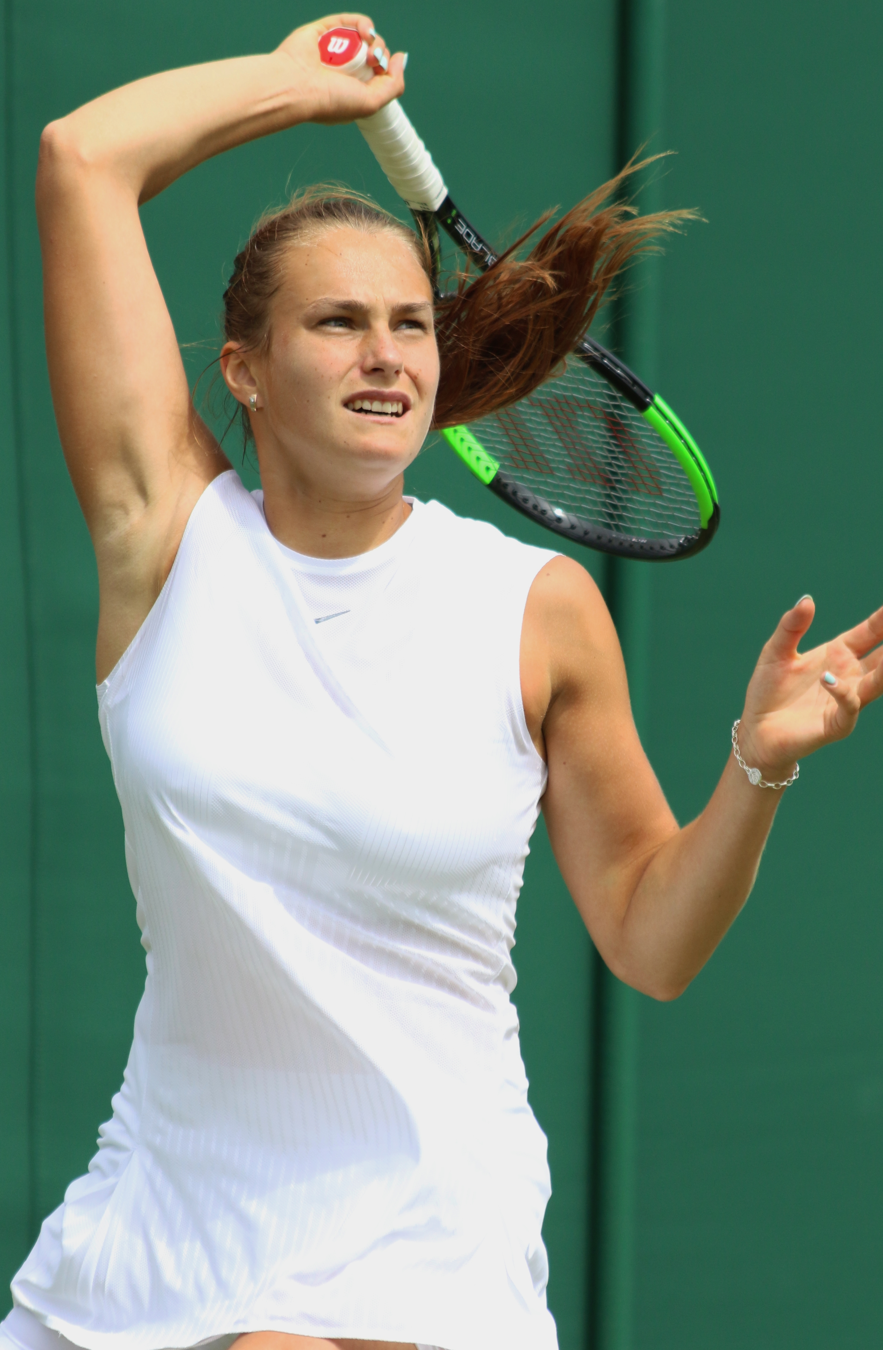 Sabalenka WM17 (22)